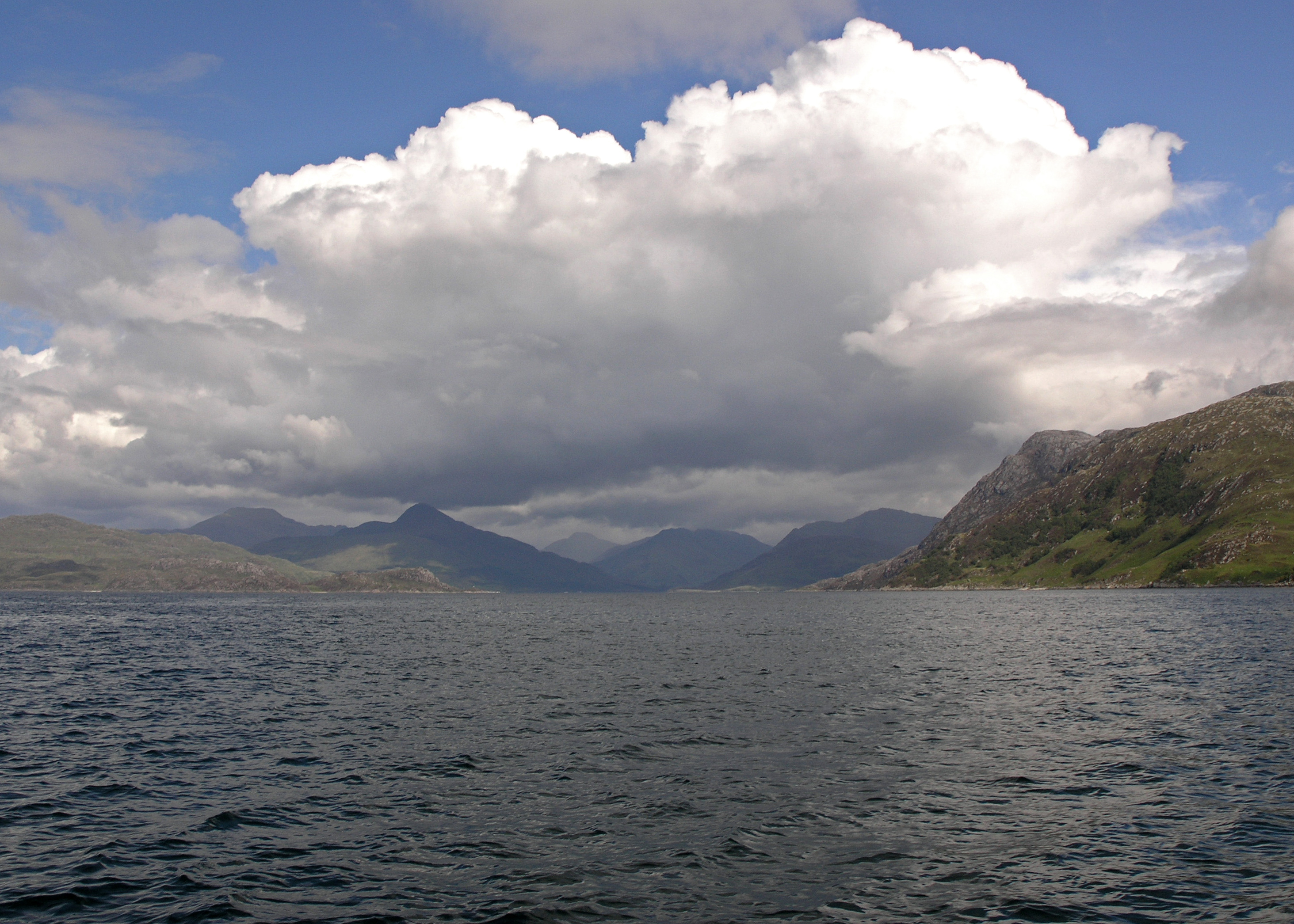 Knoydart